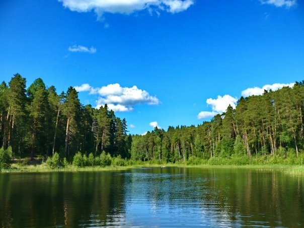 Озеро Чваниха в Медведском бору, Нолинский район This image is related to the protected area of Russia number 4310152